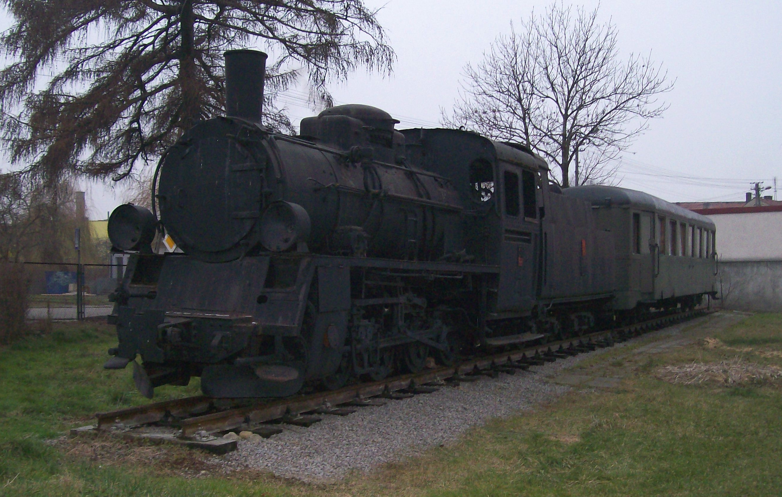 Lokomotywa Px48-1770 i wagon (typu 1Aw) Wieluńskiej Kolei Dojazdowej w Praszce